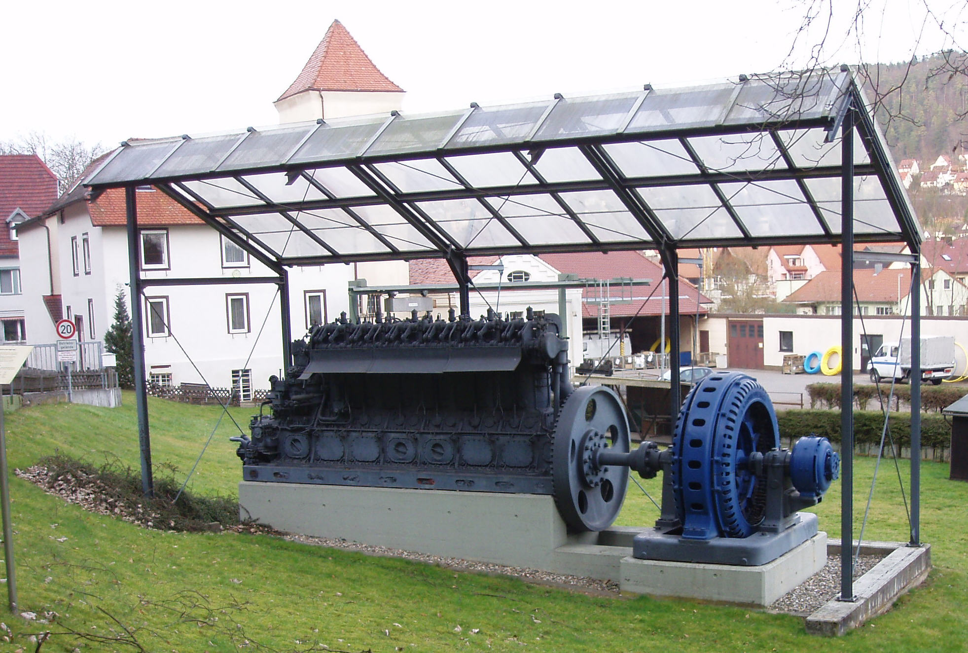 Diesel-Spitzenlast-Aggregat der Elektrizitätswerke Nagold, war 64 Jahre im Einsatz